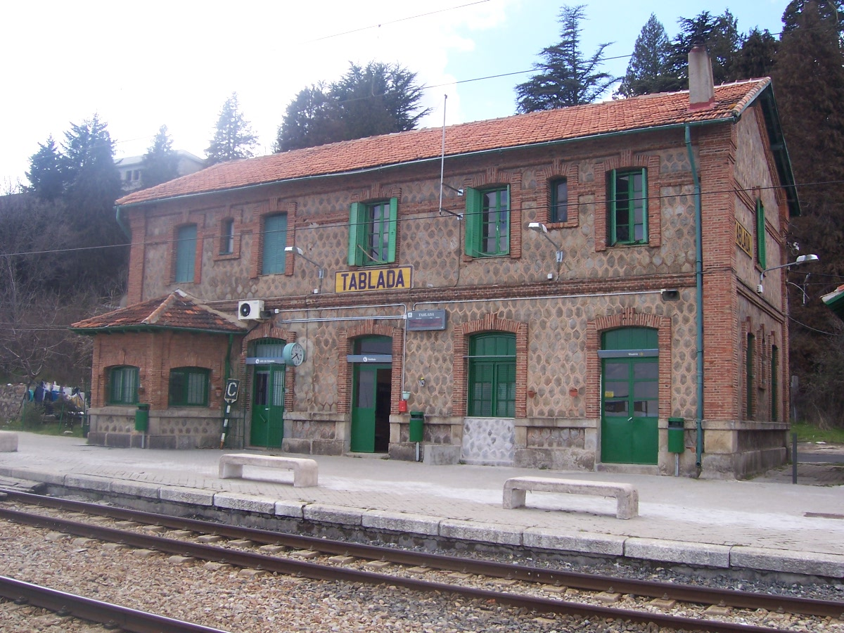 Esta es una fotografía del edificio principal de la estación de Tablada (Madrid). Esta fotografía la hice yo mismo el día 2 de Abril del año 2007. Puede que esta fotografía la hayais visto en otras webs como Panoramio o Google Earth, pero es porque también las subí yo mismo a esos lugares. En este caso la cedo amablemente a wikipedia para su enciclopédico uso.